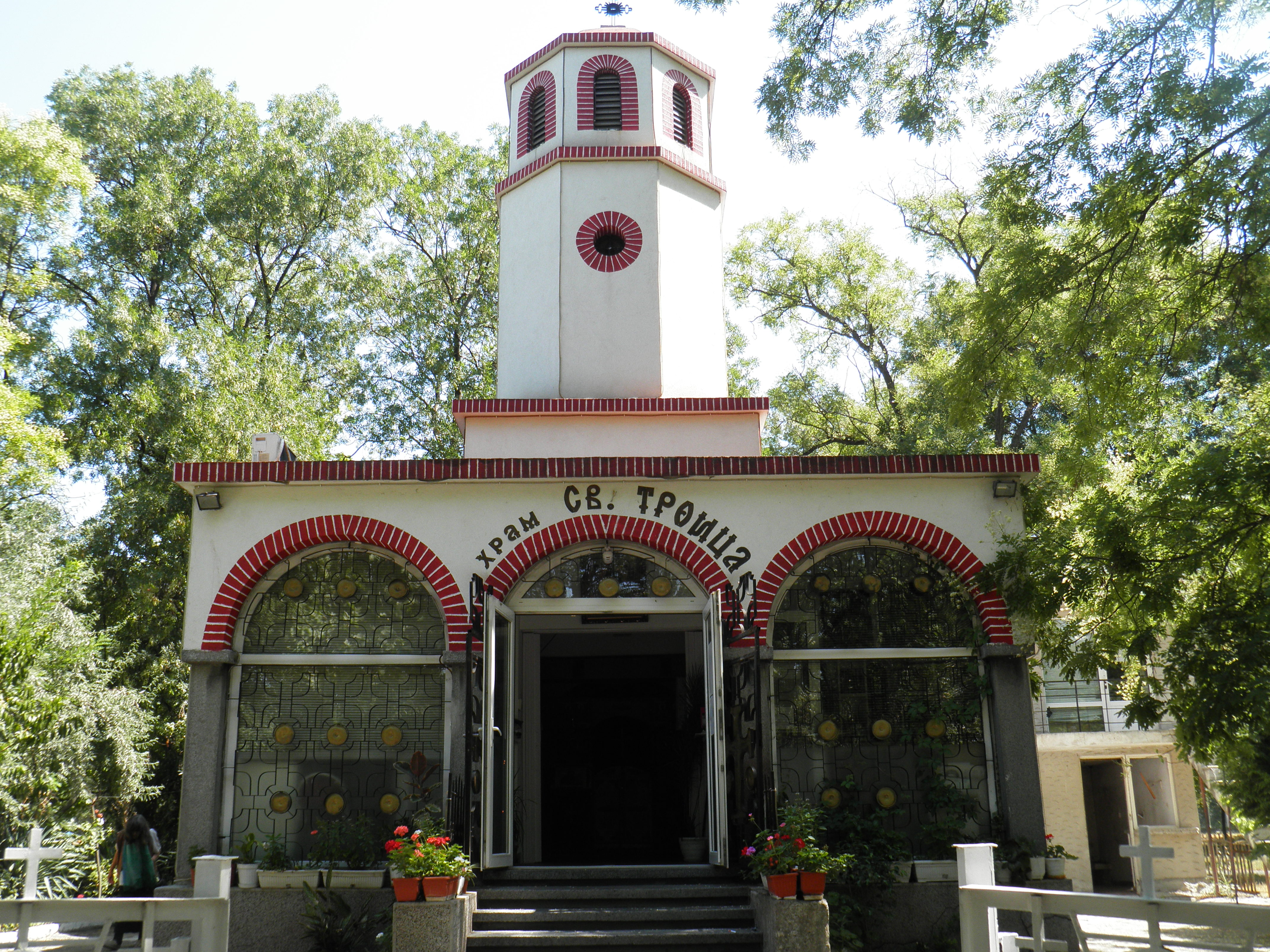 Burgas, Bulgaria